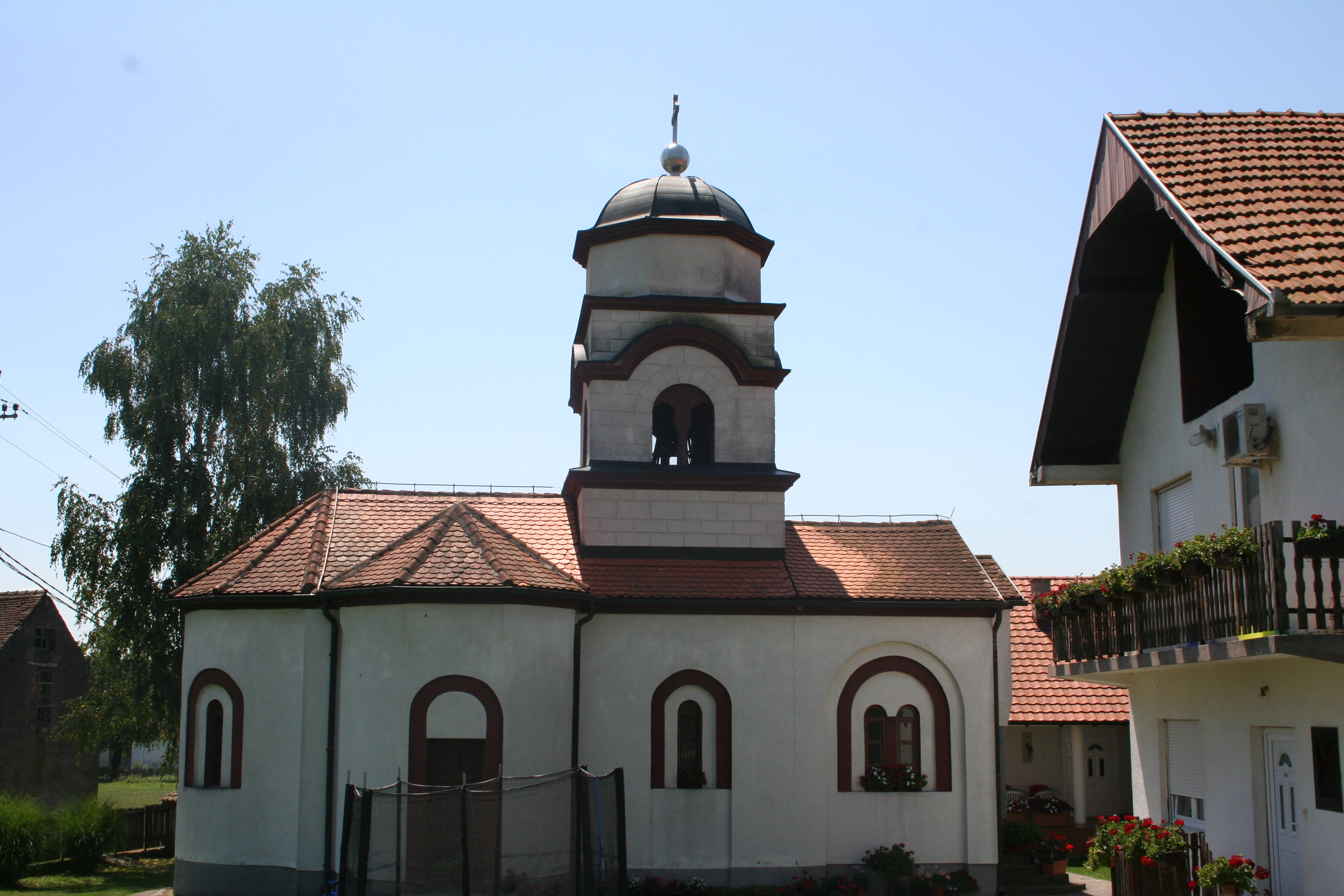 Crkva Svete Trojice, Bradić